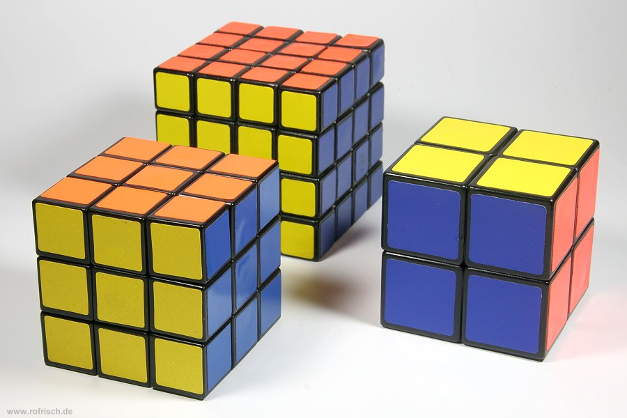 Zauberwürfel-Varianten